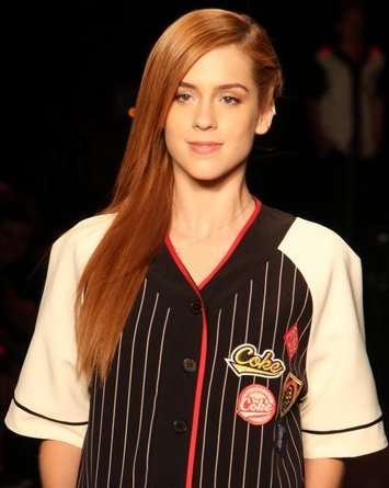 Sophia Abrahão para Coca Cola Jeans.